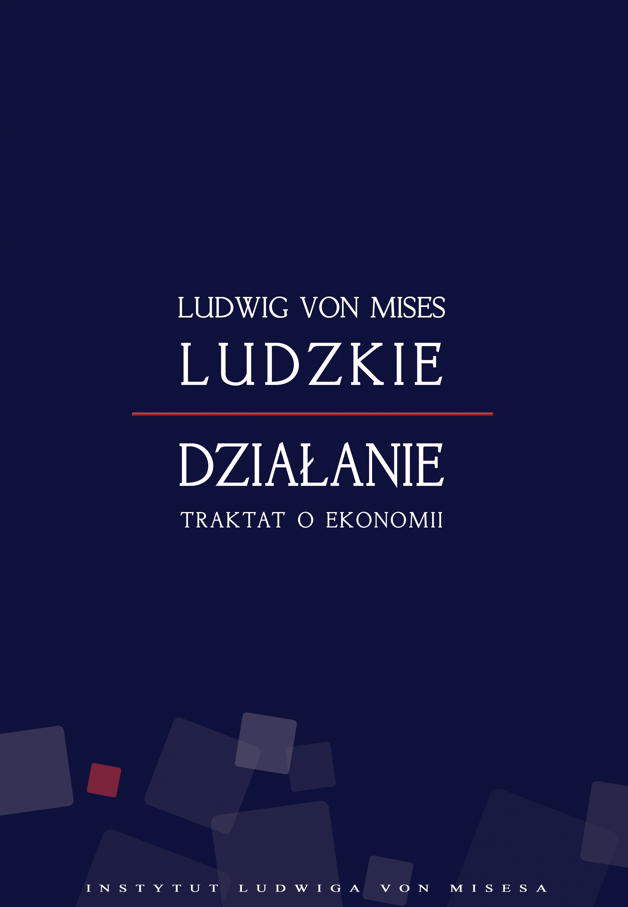 Okładka książki "Ludzkie działanie" (Book cover of "Ludzkie działanie by Ludwig von Mises, ISBN:978-83-926160-0-9